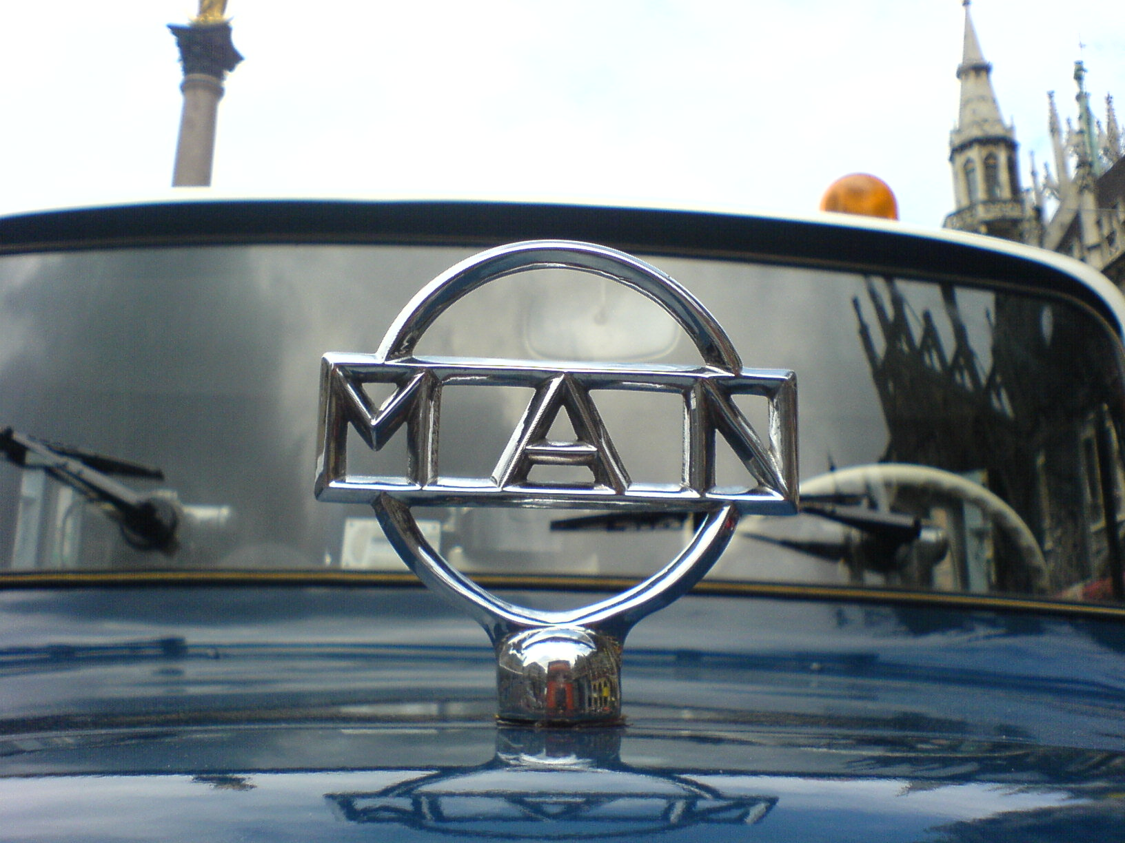 M.A.N.-Schild auf dem Kühlergrill eines LKW (Tornado 19.230 HAK Allrad-Kipper, Bj. 1973)